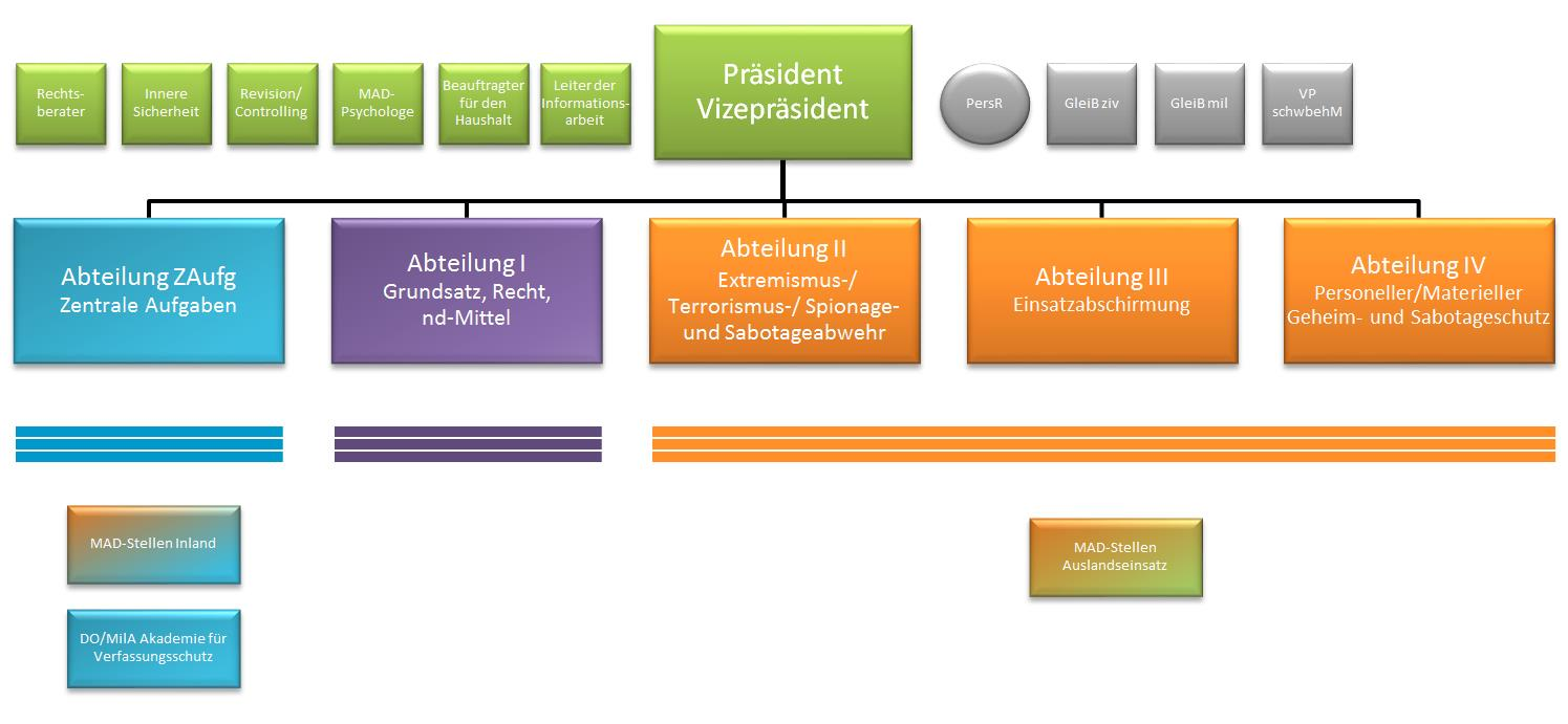 Organisationsplan MAD